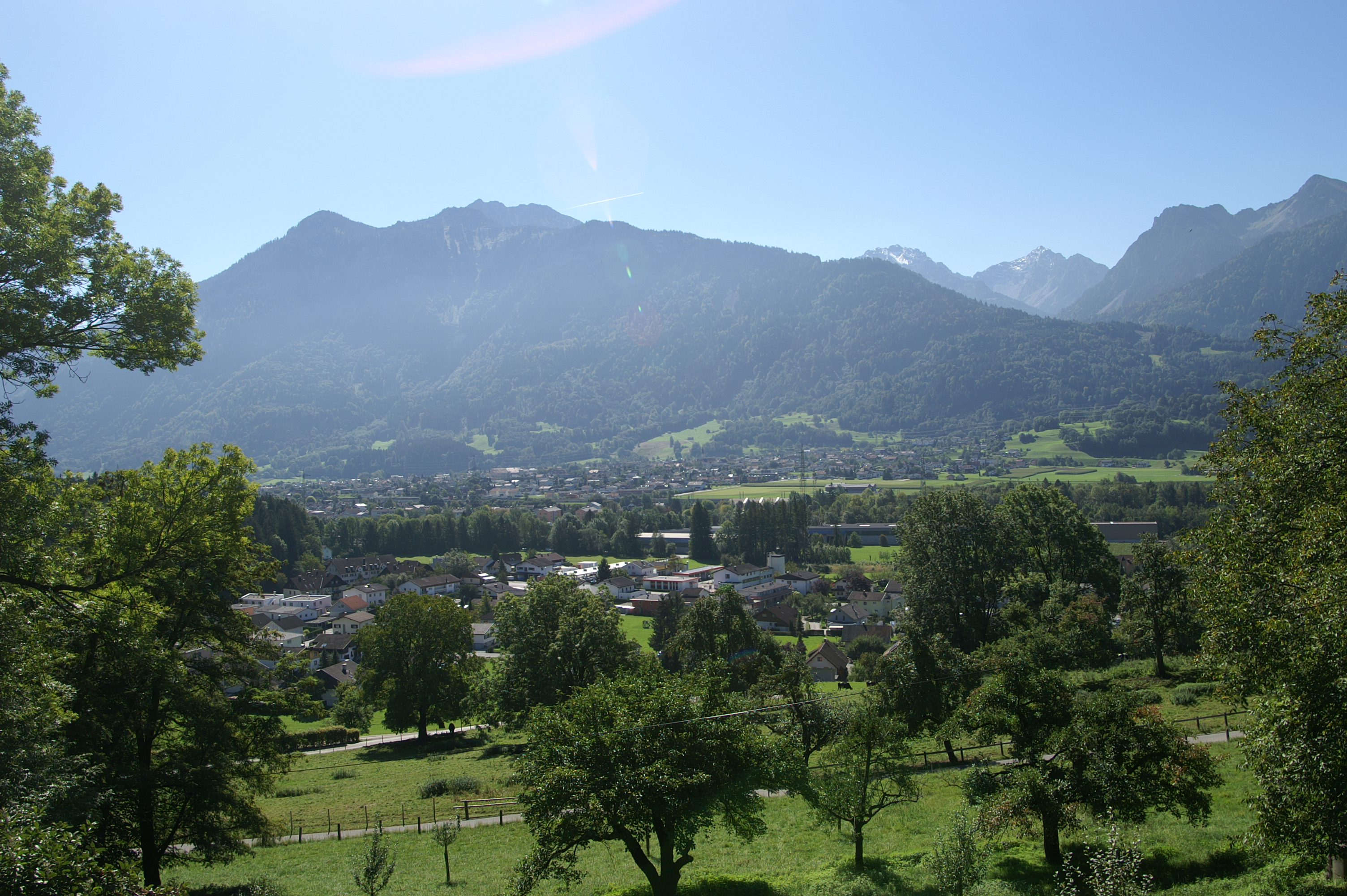 Blick vom Jagdberg auf Schlins undNenzing